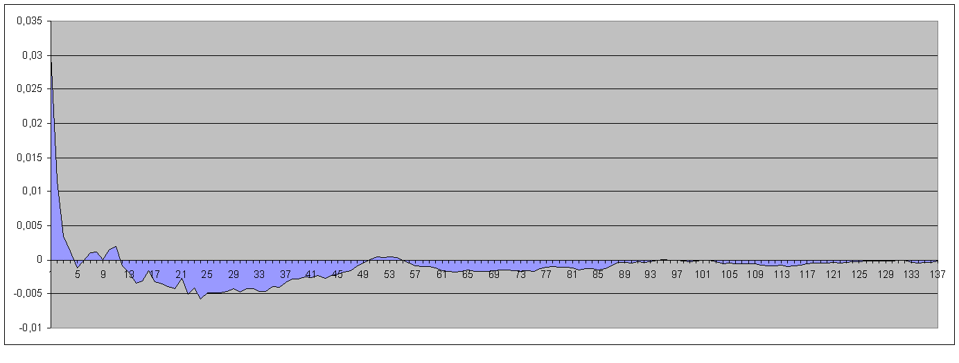 Errore in % di un test del calcolo del pi greco eseguito con il metodo di montecarlo